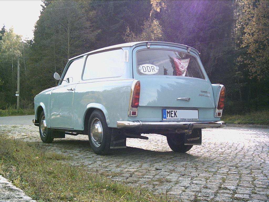 Trabant 601deluxe Universal, Modell 1970